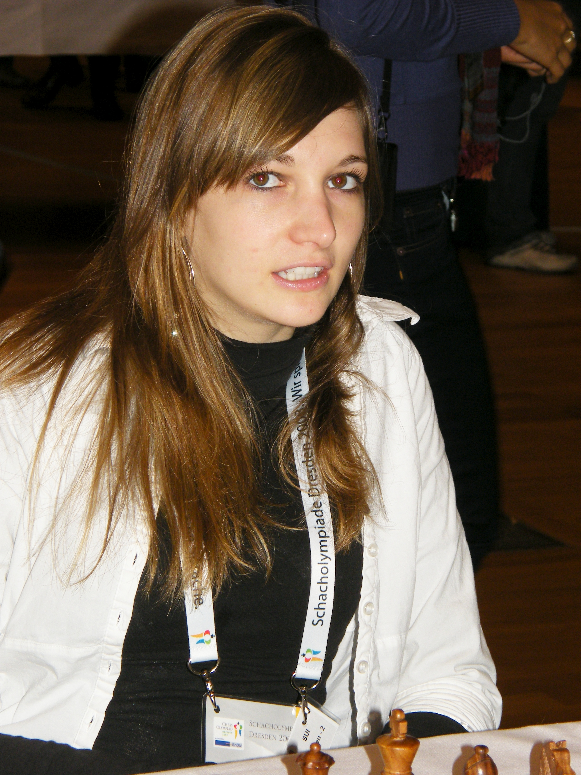 Monika Seps bei der 38. Schacholympiade in Dresden 2008